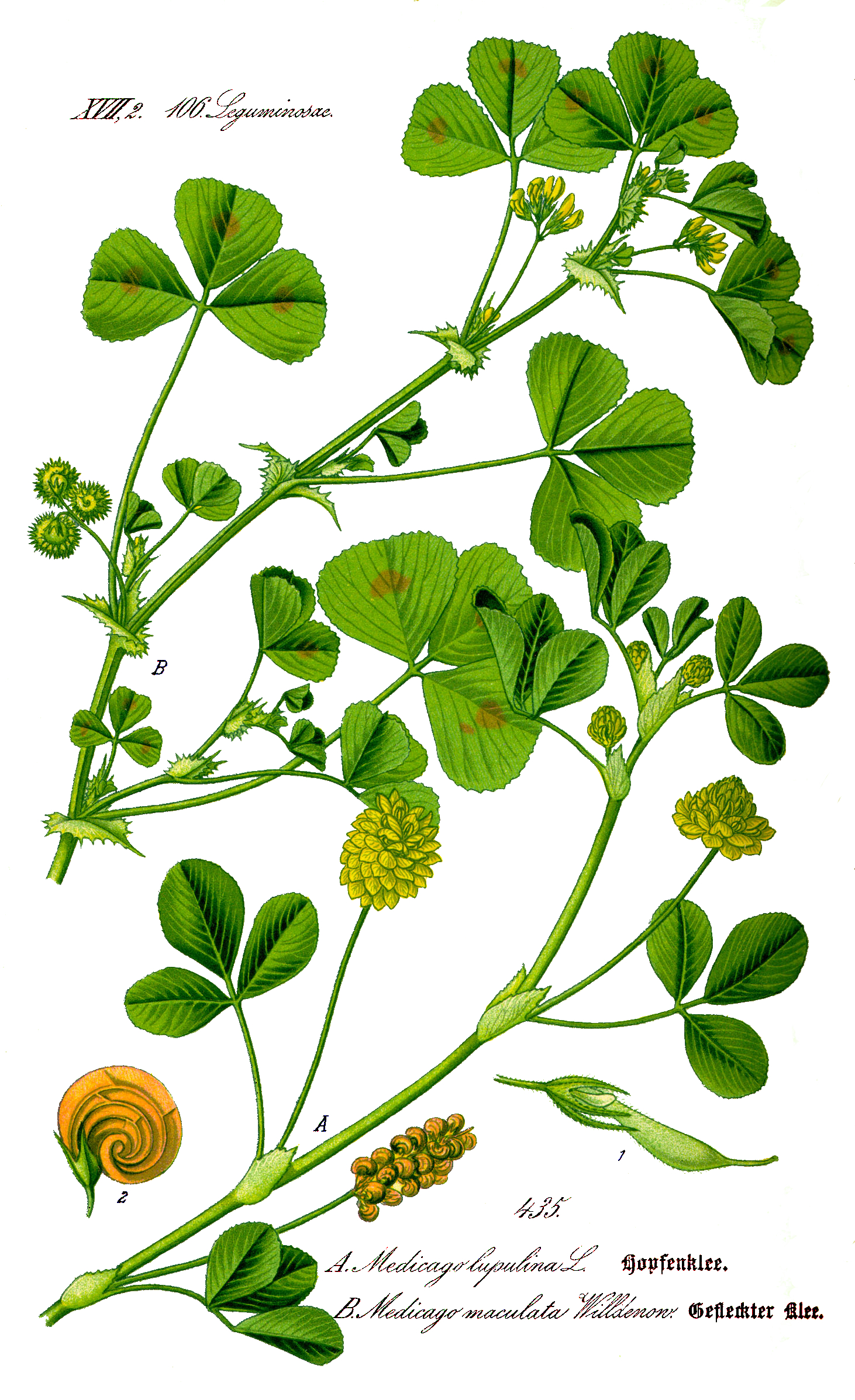 Name Medicago arabica ;Family:Fabaceae